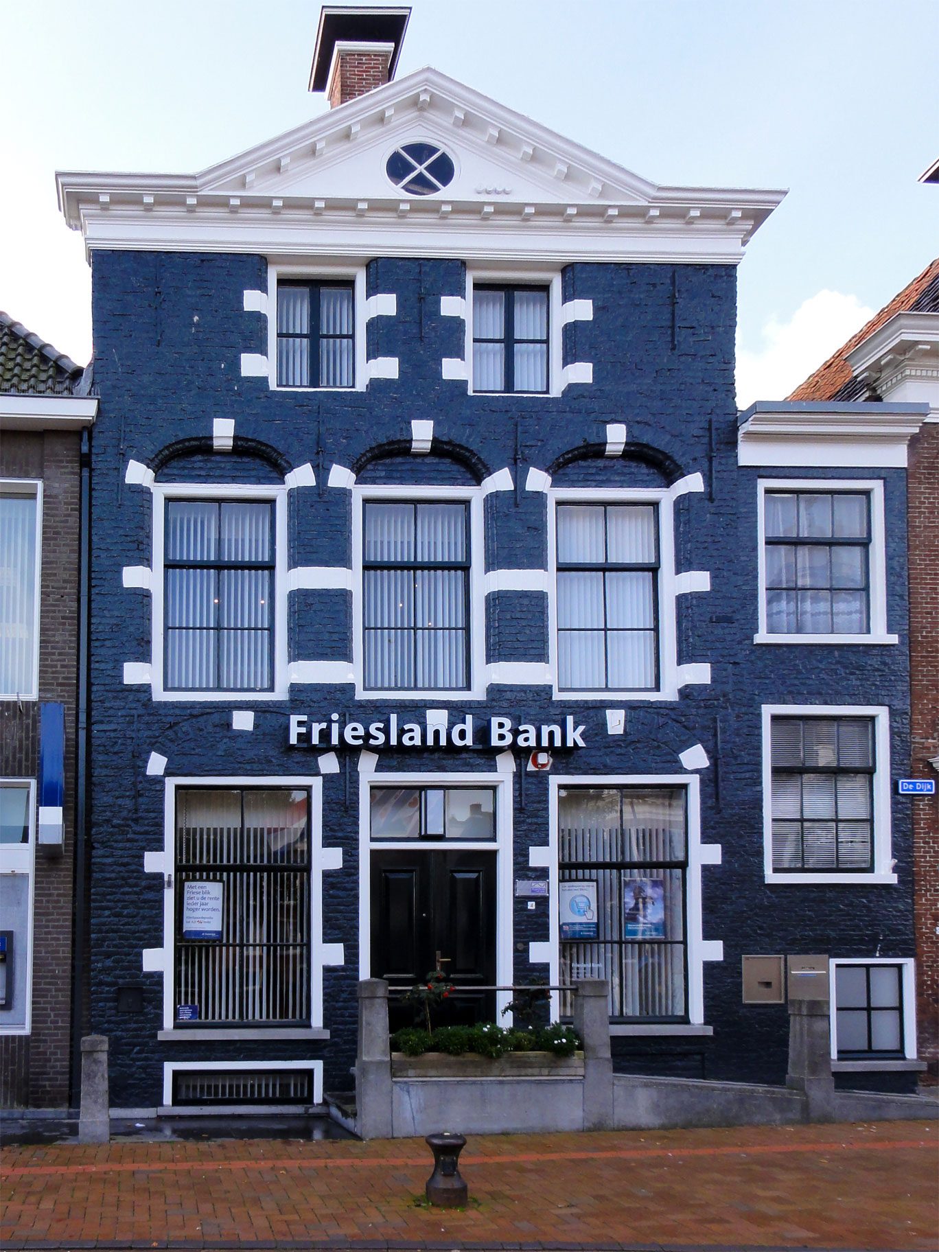 De Dijk 2 Dokkum, rijksmonument